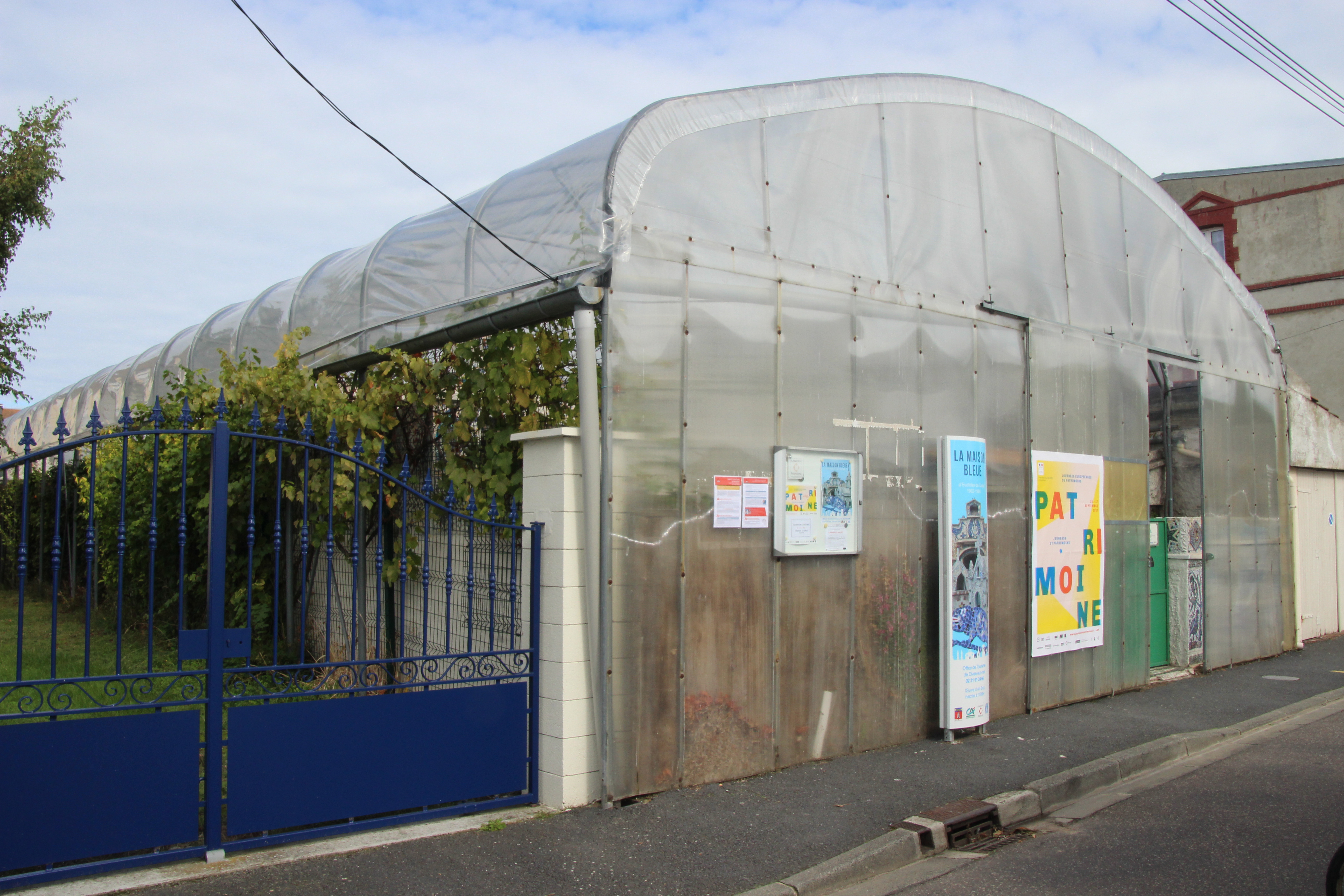 Extérieur de la maison bleue à Dives-sur-Mer (#100wikicommonsdays r 2 jour 56)